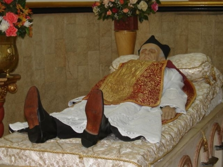 MAxima de marianito